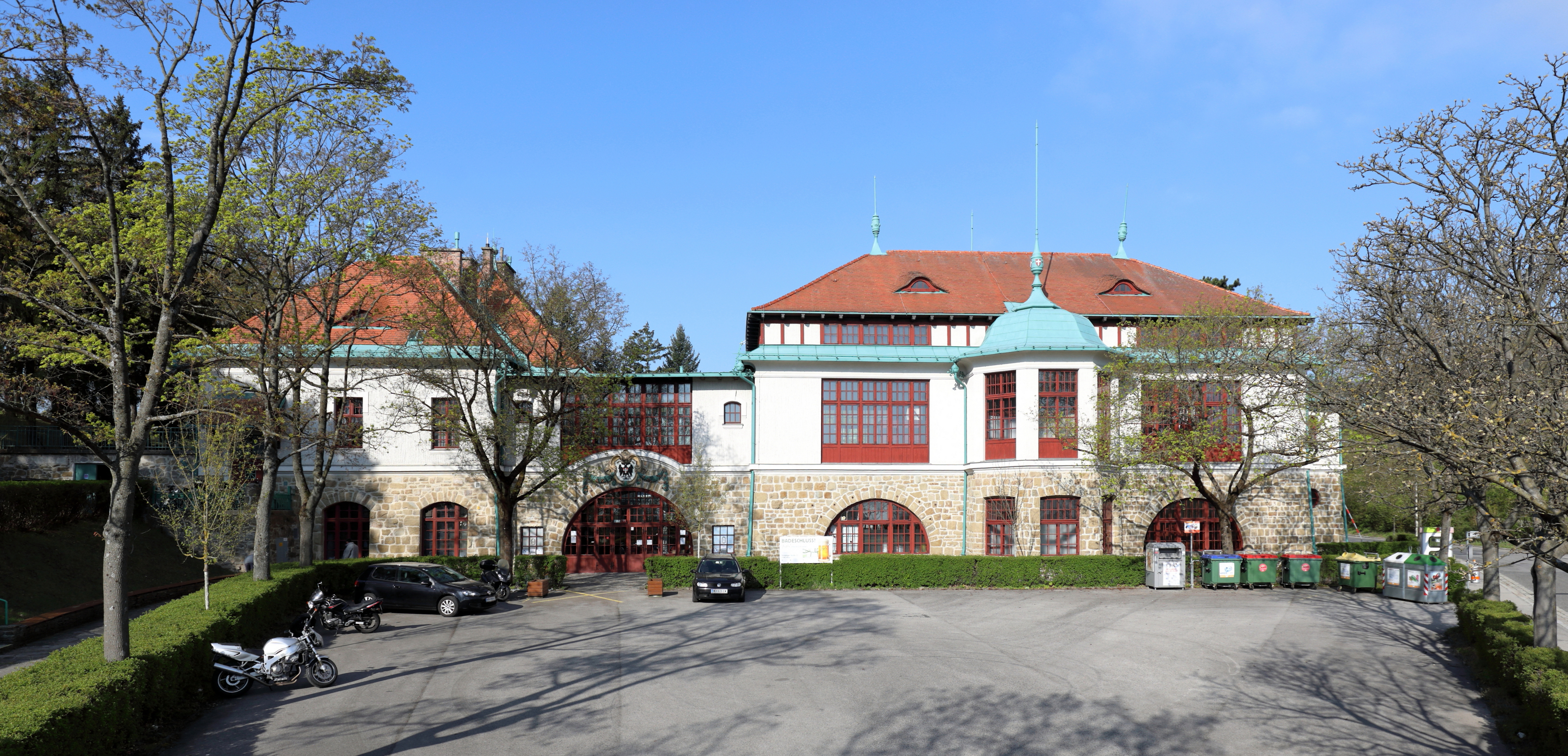 Hauptgebäude des Krapfenwaldlbades im 19. Wiener Bezirk Döbling.Das Gebäude wurde als Volksrestaurant in „Heimatstilbauweise“ an Stelle eines alten Glassalons errichtet und am 30. April 1911 eröffnet. Neben dem Restaurant eröffnete am 17. Juni 1923 die Gemeinde Wien ein Freibad. Nach dem II. WK wurde das Freibad umgebaut, erweitert (Fassungsvermögen 4.500 Personen, Gesamtfläche 44.000 m²) und am 29.Mai 1952 neu eröffnet. Im Zuge dieser Umgestaltung des Freibades wurde das ehemalige Restaurantgebäude in die Badeanlage integriert.